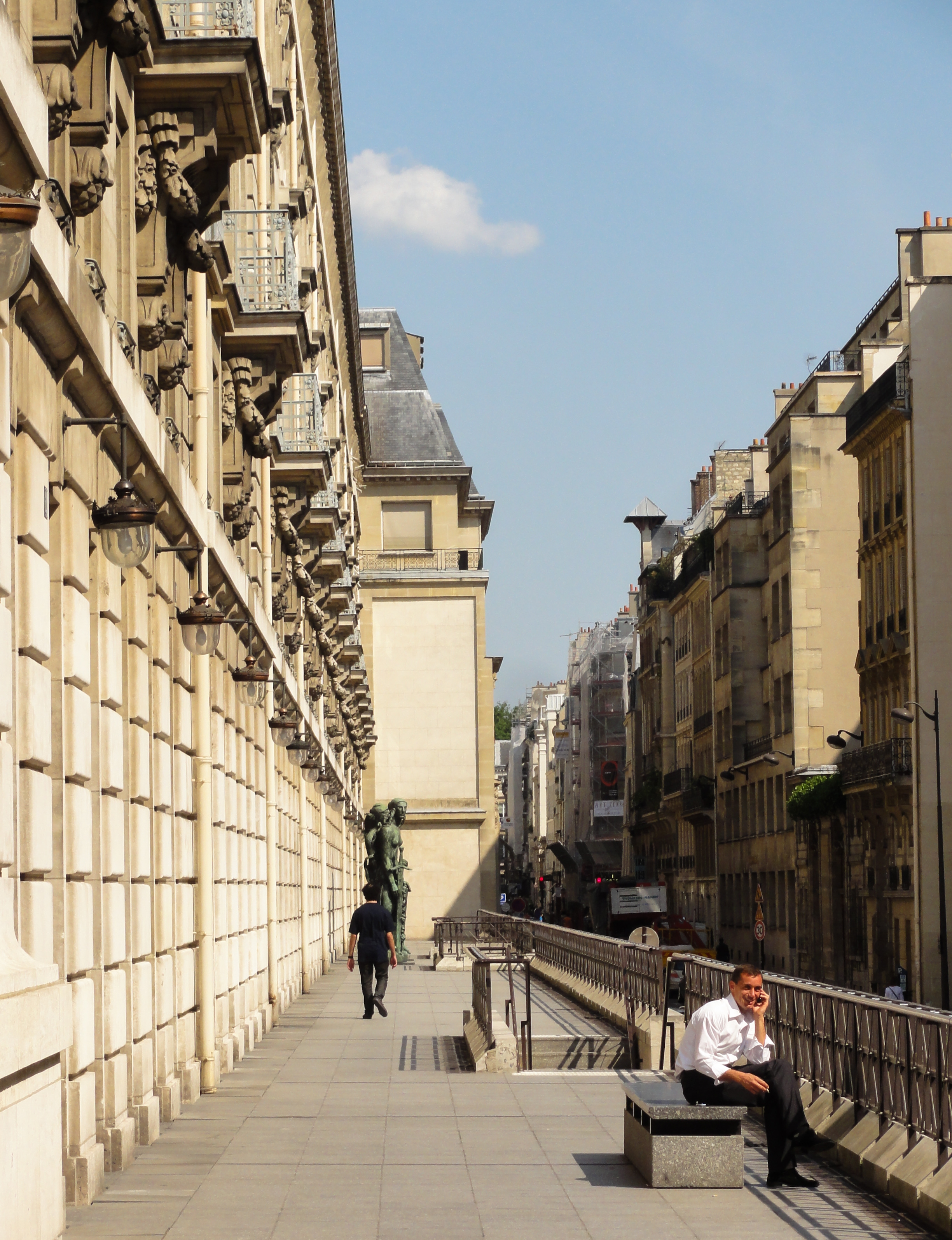 Musée d'Orsay, Rue de Lille, Paris, France